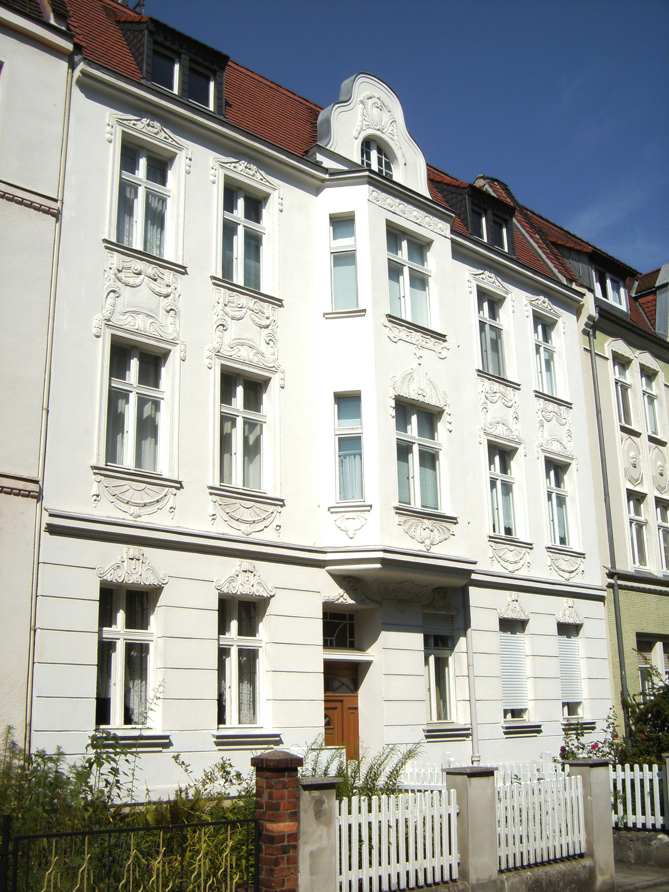 Wernerstr. 40